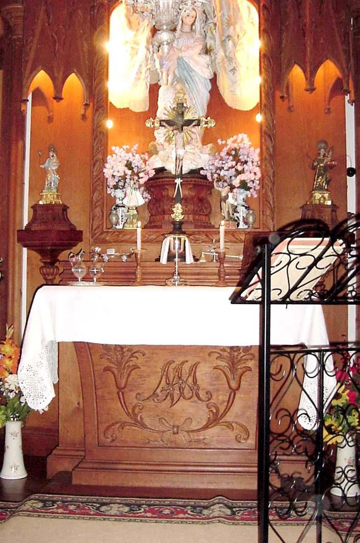 Villa Maria, Capela de Nossa Senhora das Vitórias, Angra do Heroísmo, ilha Terceira, Açores, Portugal.